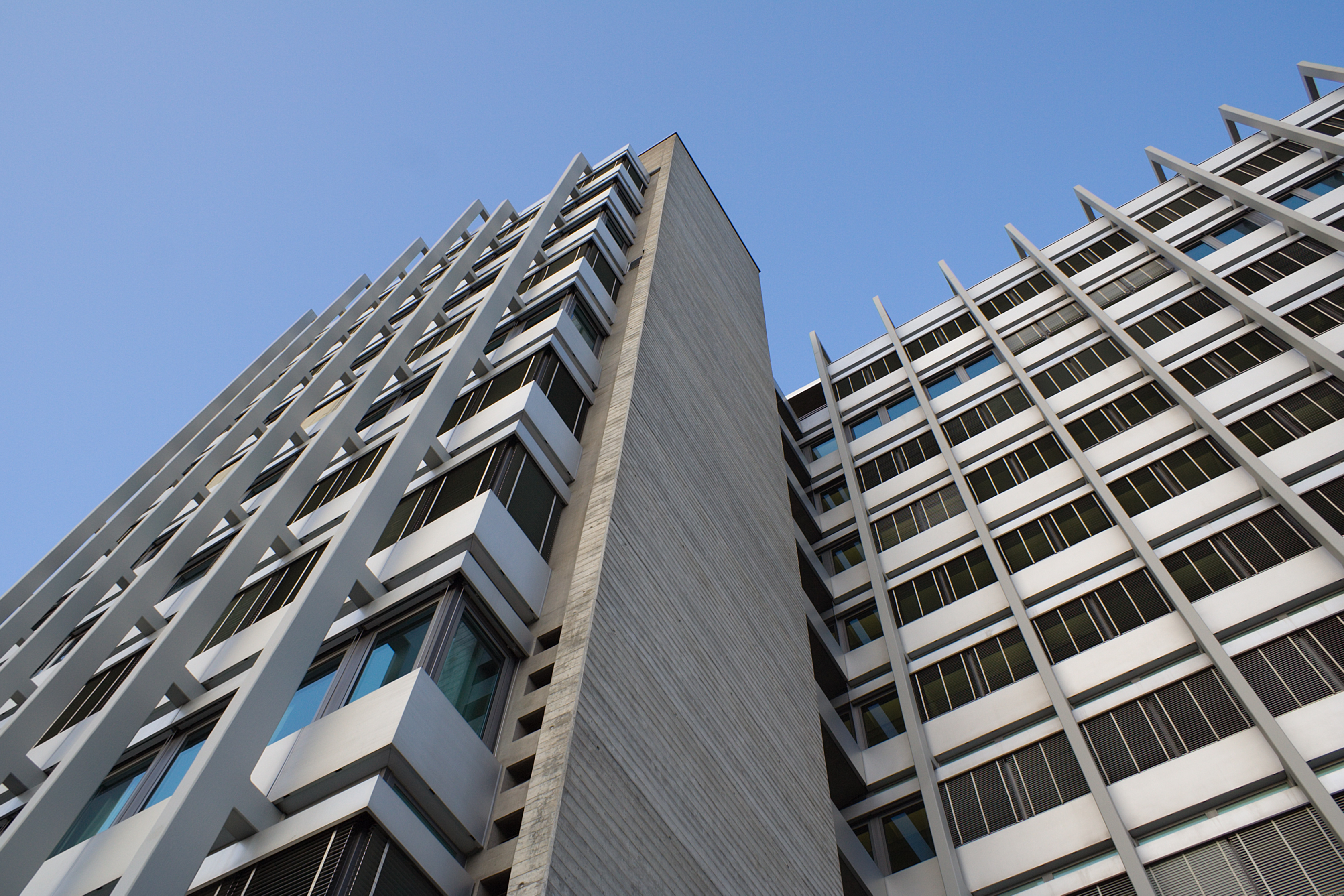 Hochhaus zur Palme von unten, Bleicherweg 33, Zürich, Schweiz